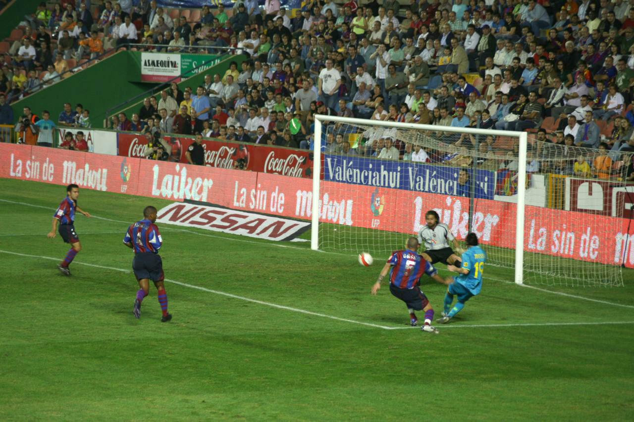 Lionel Messi marcant un Gol al Llevant-Barcelona del 29/09/2007